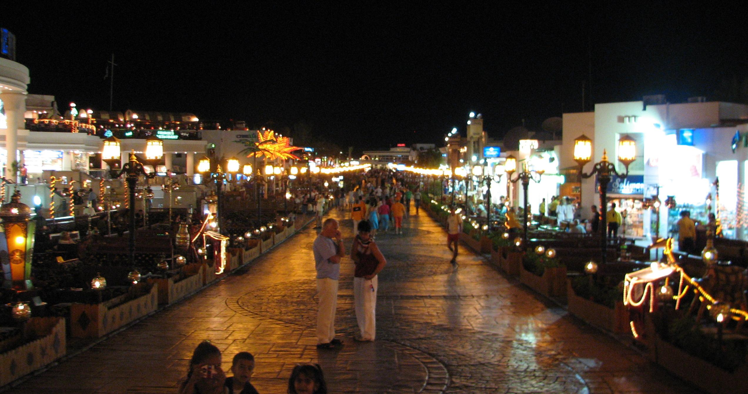 Jedna z uliczek dzielincy miasta Sharm el-szejk - Na'ama Bay.Na górze jest neon z napisem "PANORAMA"